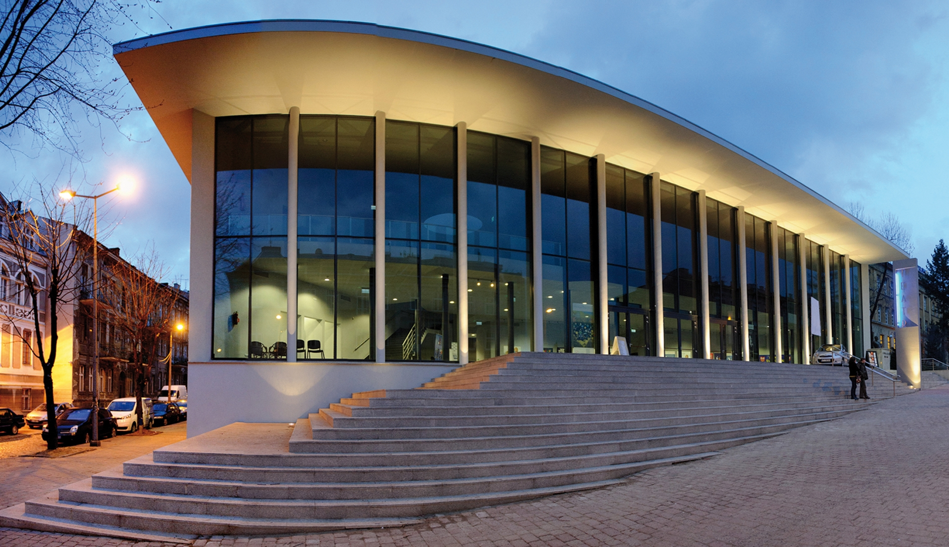 Budynek Teatru im. Ludwika Solskiego w Tarnowie